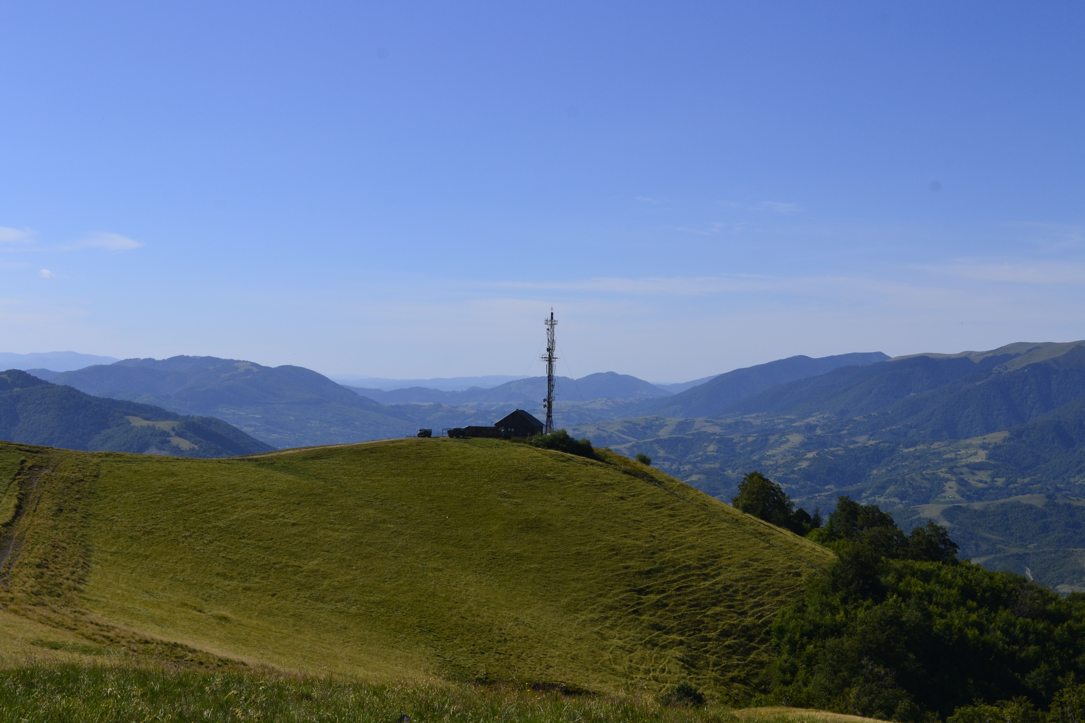 Метеостанці на хребті Красна біля села Колочава